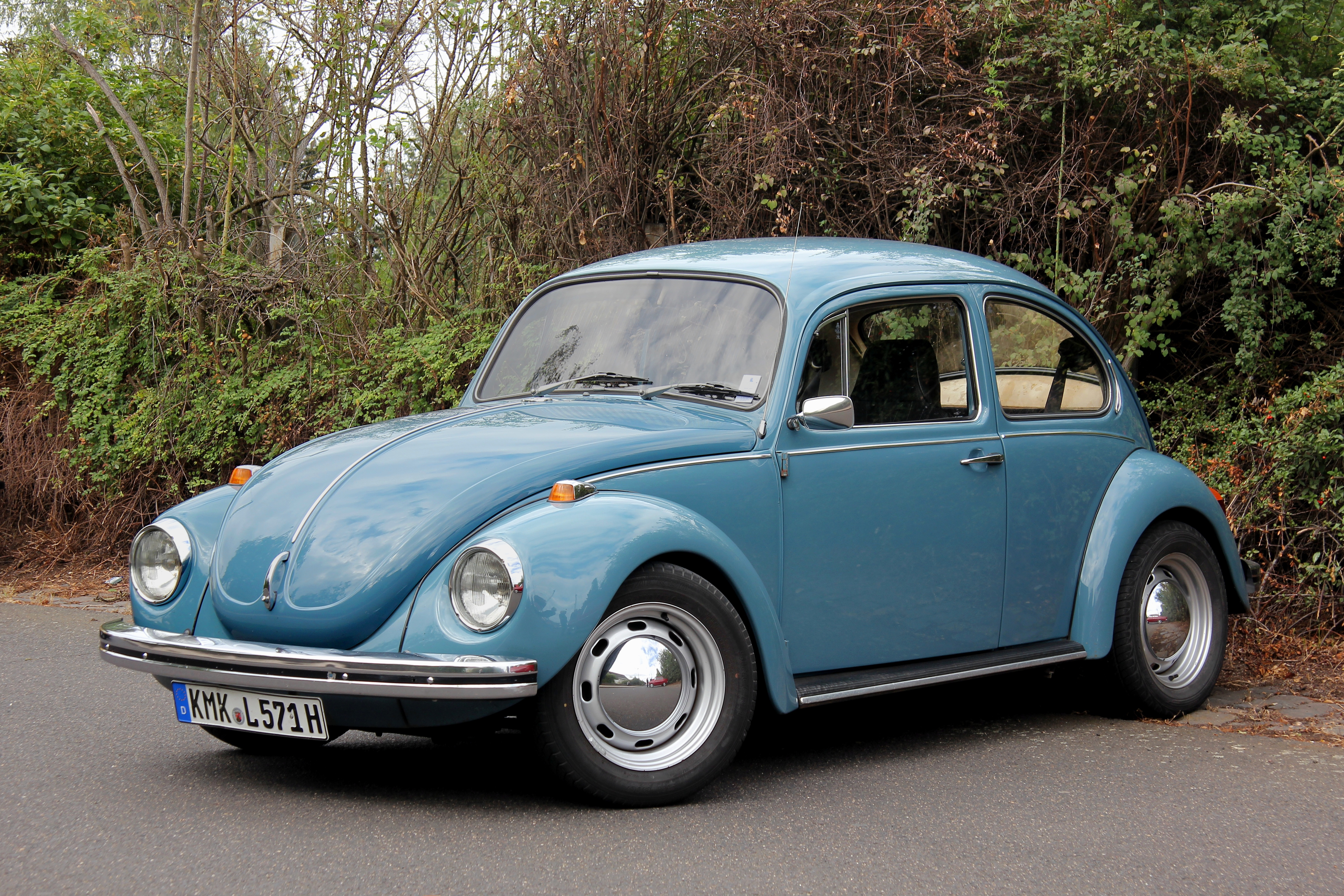 VW 1302, Bauzeit: Sommer 1970 bis Sommer 1972; Räder des abgebildeten Fahrzeugs nicht serienmäßig, Kennzeichen verändert